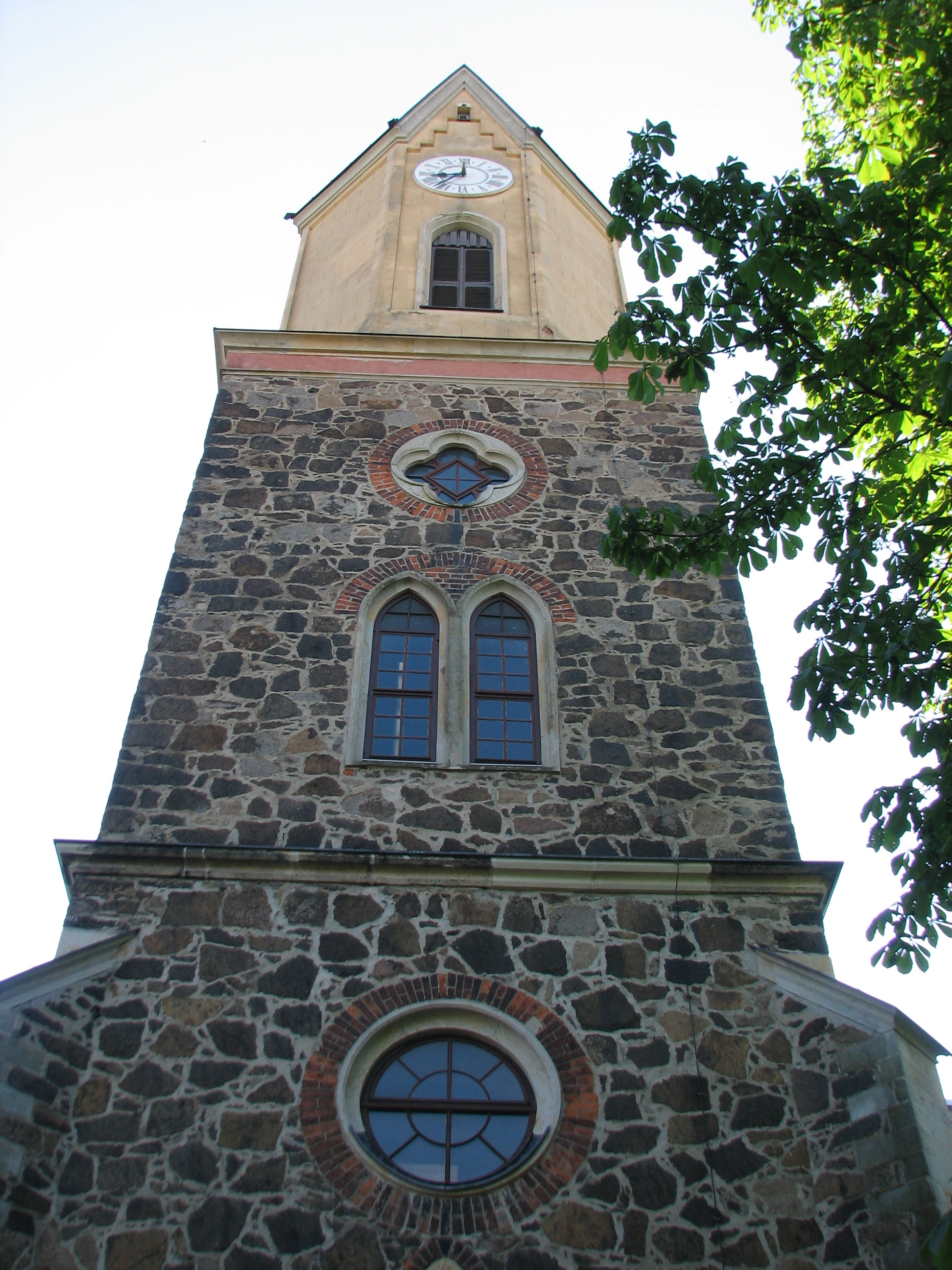 Blick hinauf zum Kirchturm in Sommerfeld